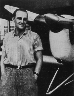 Jaroslav Lonek, konstruktér letadel Lonek a Zlín